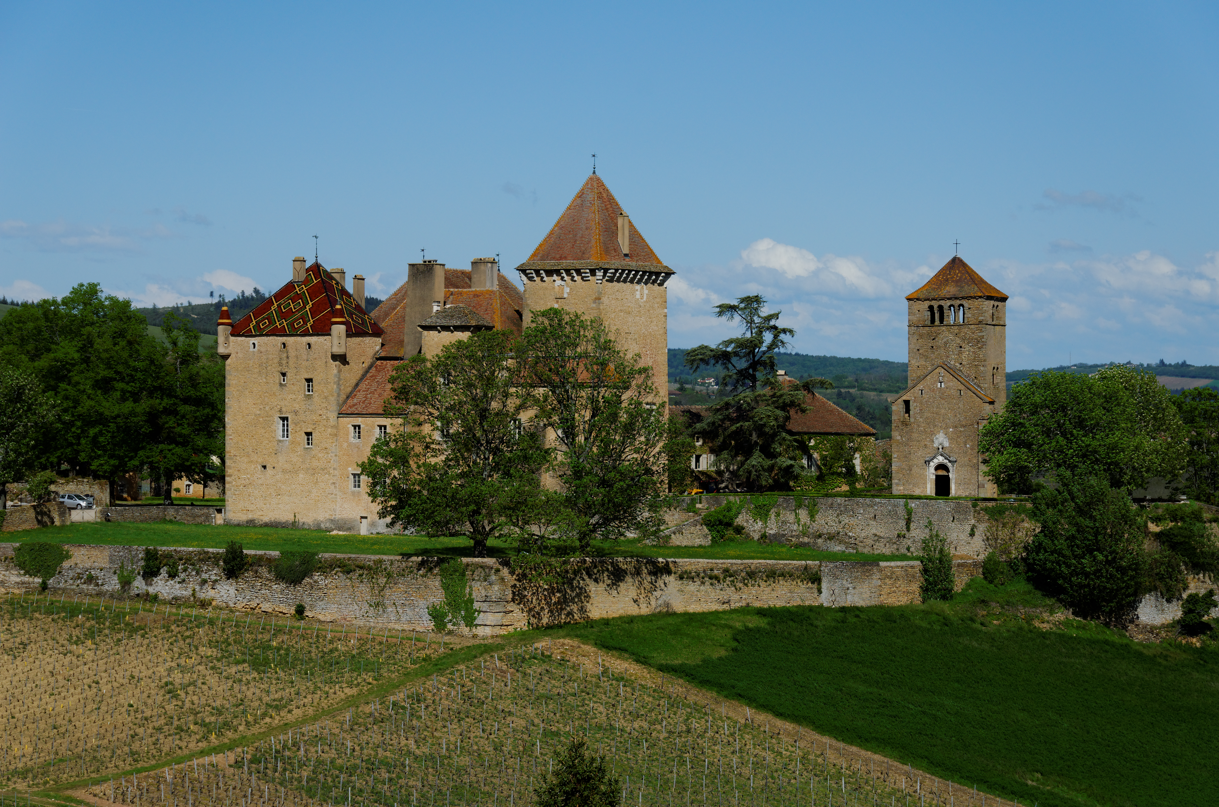 Vue du Château de Pierreclos, Saône et Loire (71), France. Edifice répertorié dans la base Mérimée, base de données sur le patrimoine architectural français du ministère de la Culture, sous la référence PA00113392